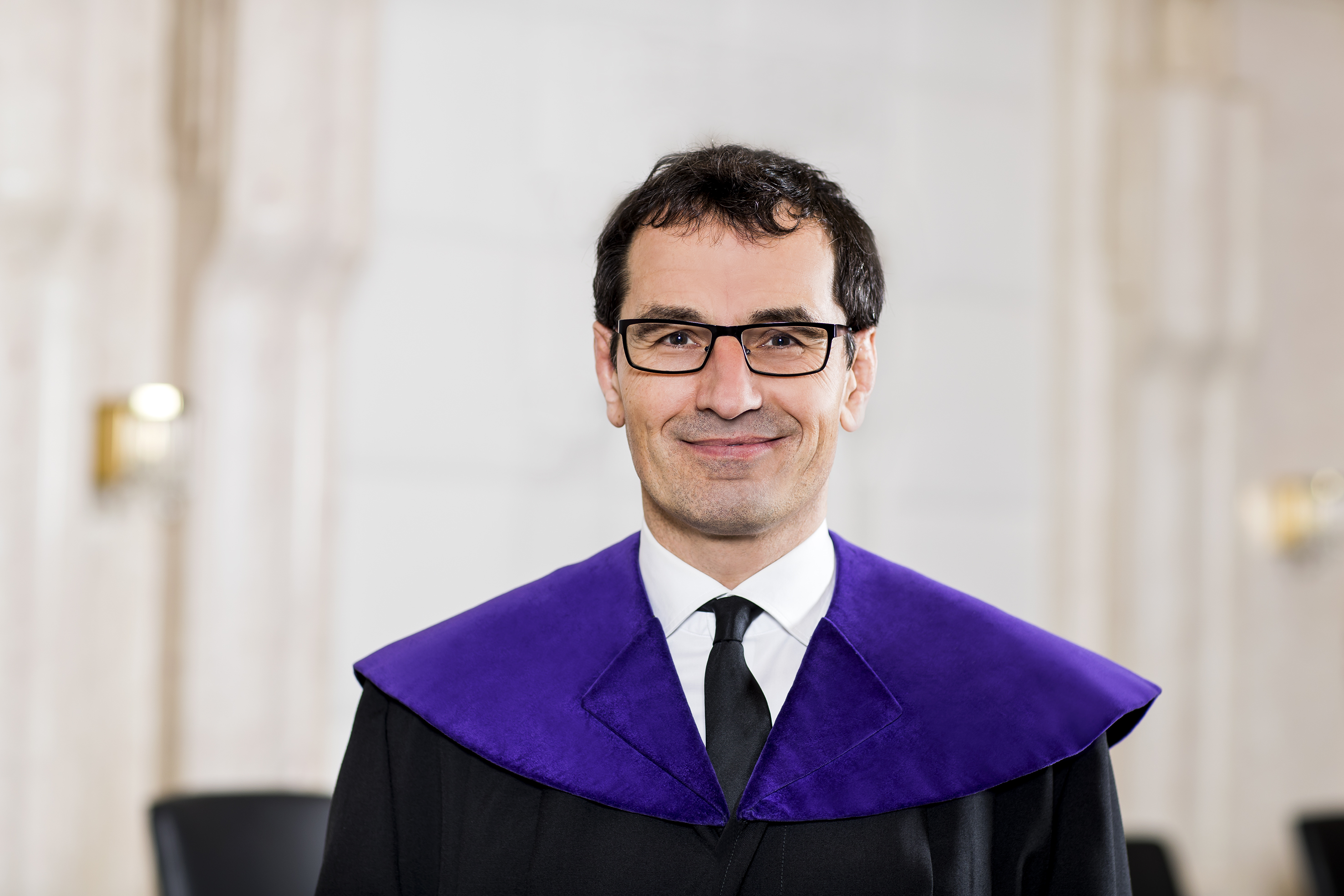 Dr. Michael Rami, Mitglied des österreichischen Verfassungsgerichtshofs seit 2018.